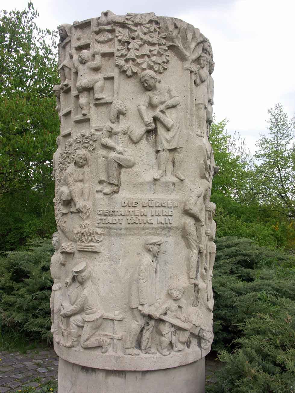 Stele in Halle-Neustadt, nahe Magistrale/ Einsteinstraße: "Aufbauhelfer" von Rudolf Hilscher von 1975; Beispiel für sozialistische Kunst am Bau; eigenes Foto 30-04-2006 Bettenburg